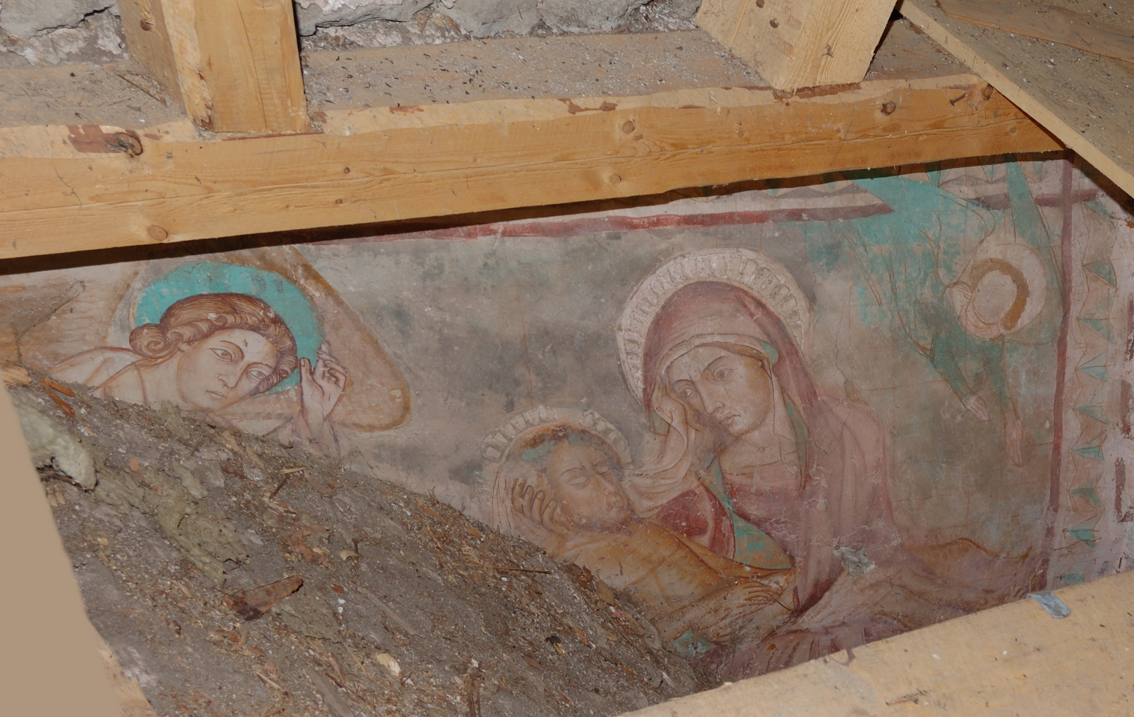 Pieta Freska na povale kostola sv. Ladislava v Necpaloch